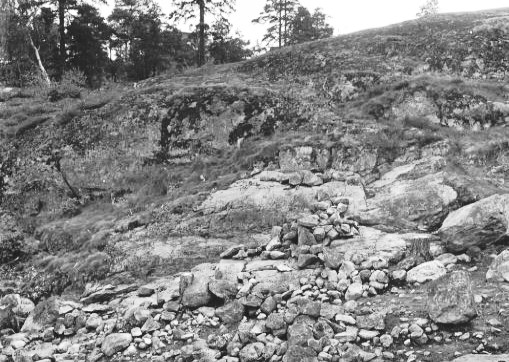 En undersökning av fornborgen i Henriksdal gjordes år 1967 inför den nya bebyggelsen på Henriksdalsberget. Det upptäcktes då att borgen blivit skadad när Henriksdals reningsverk anlades.